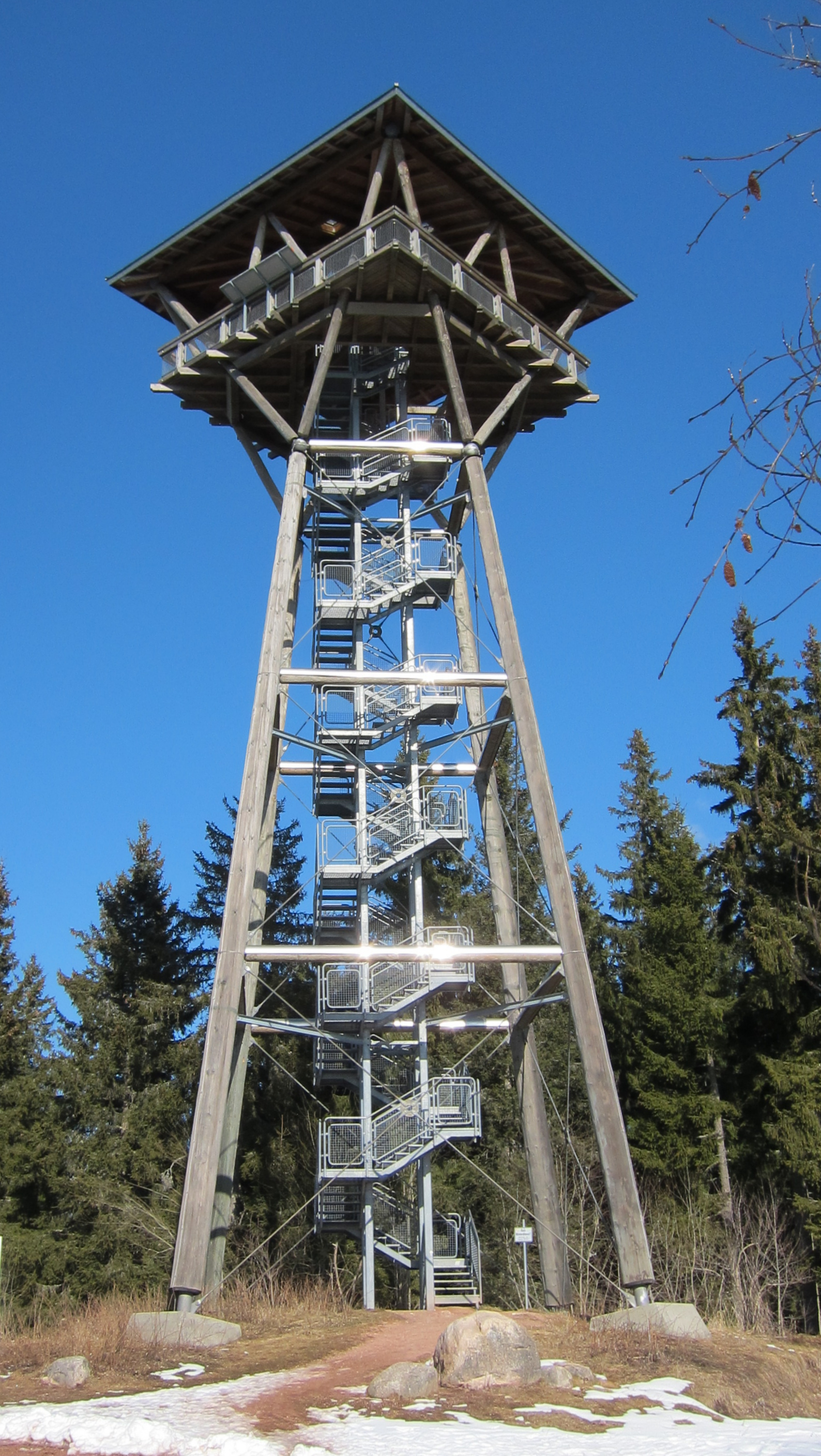 Riesenbühlturm am Schluchsee mit Beschreibung